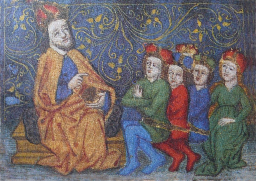 Vita Caroli - Karel IV. uděluje poučení svým nástupcům